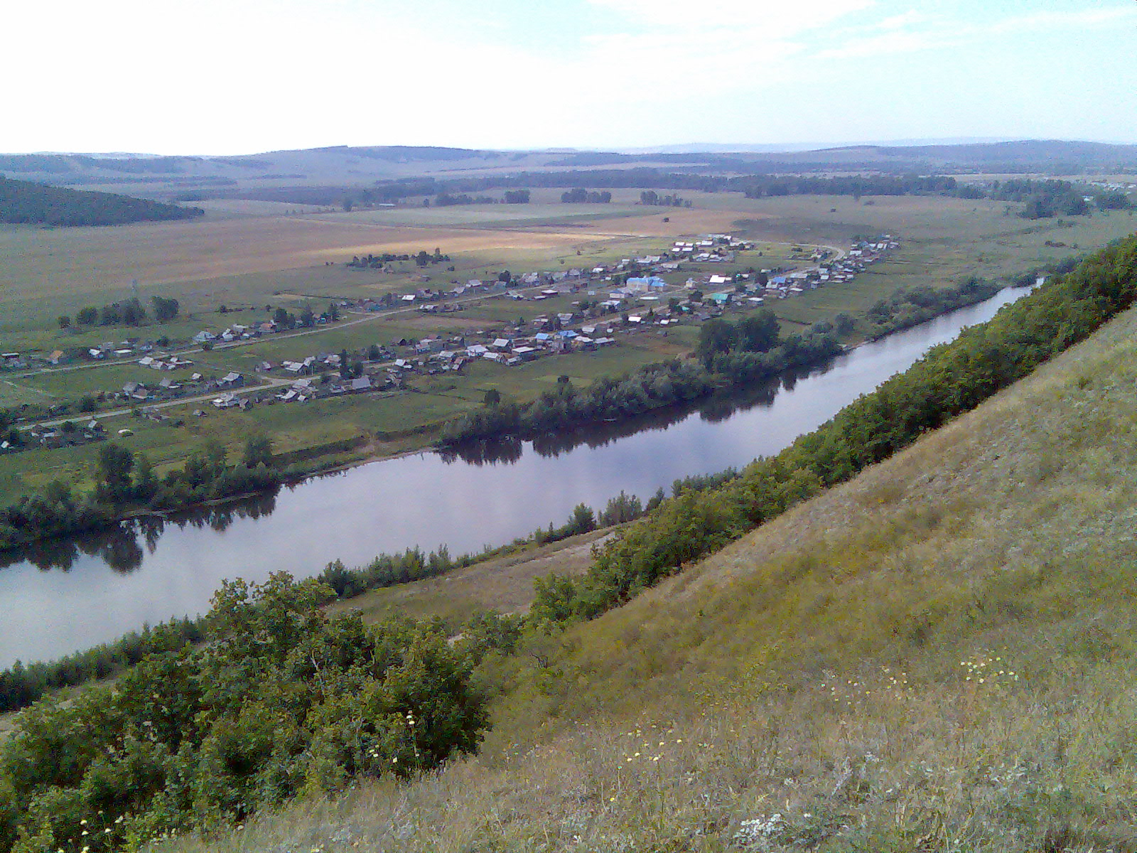 Village Verhnebikkuzino (Верхнебиккузино), Bashkortostan.